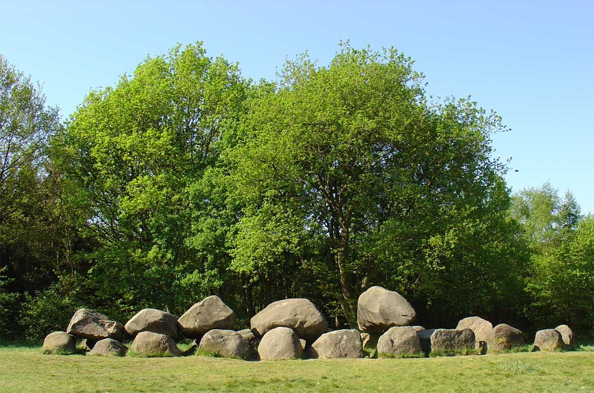 Hunebed D19 nabij Drouwen